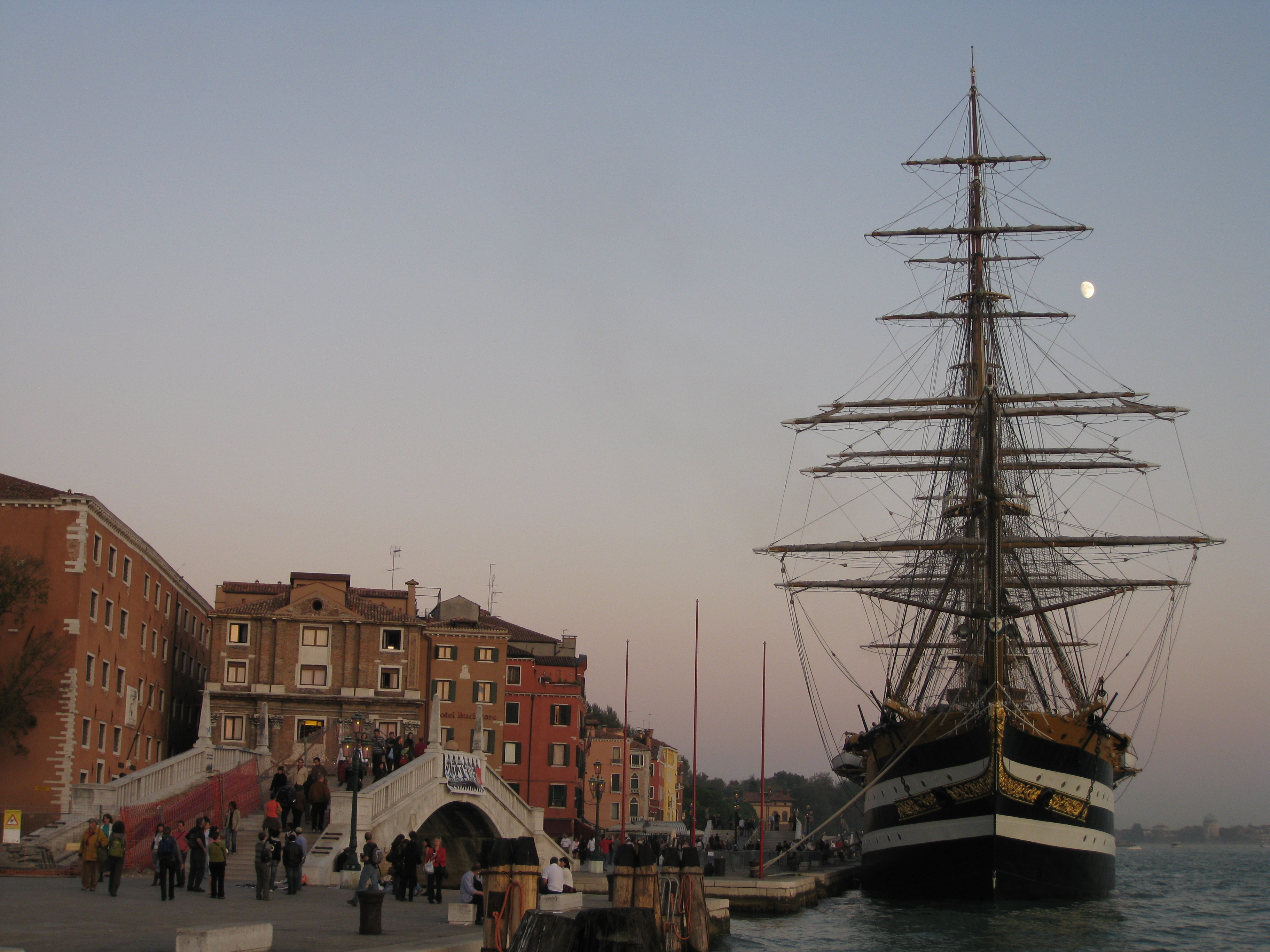 Venezia - Amerigo Vespucci